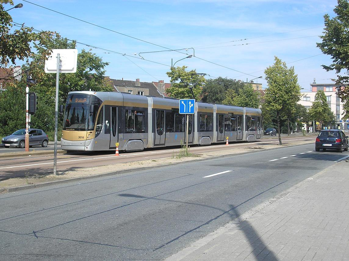 Un T3000 sur la ligne 4 sur un site propre infranchissable. Un T3000 sur la ligne 4 au Carrefour Stalle.